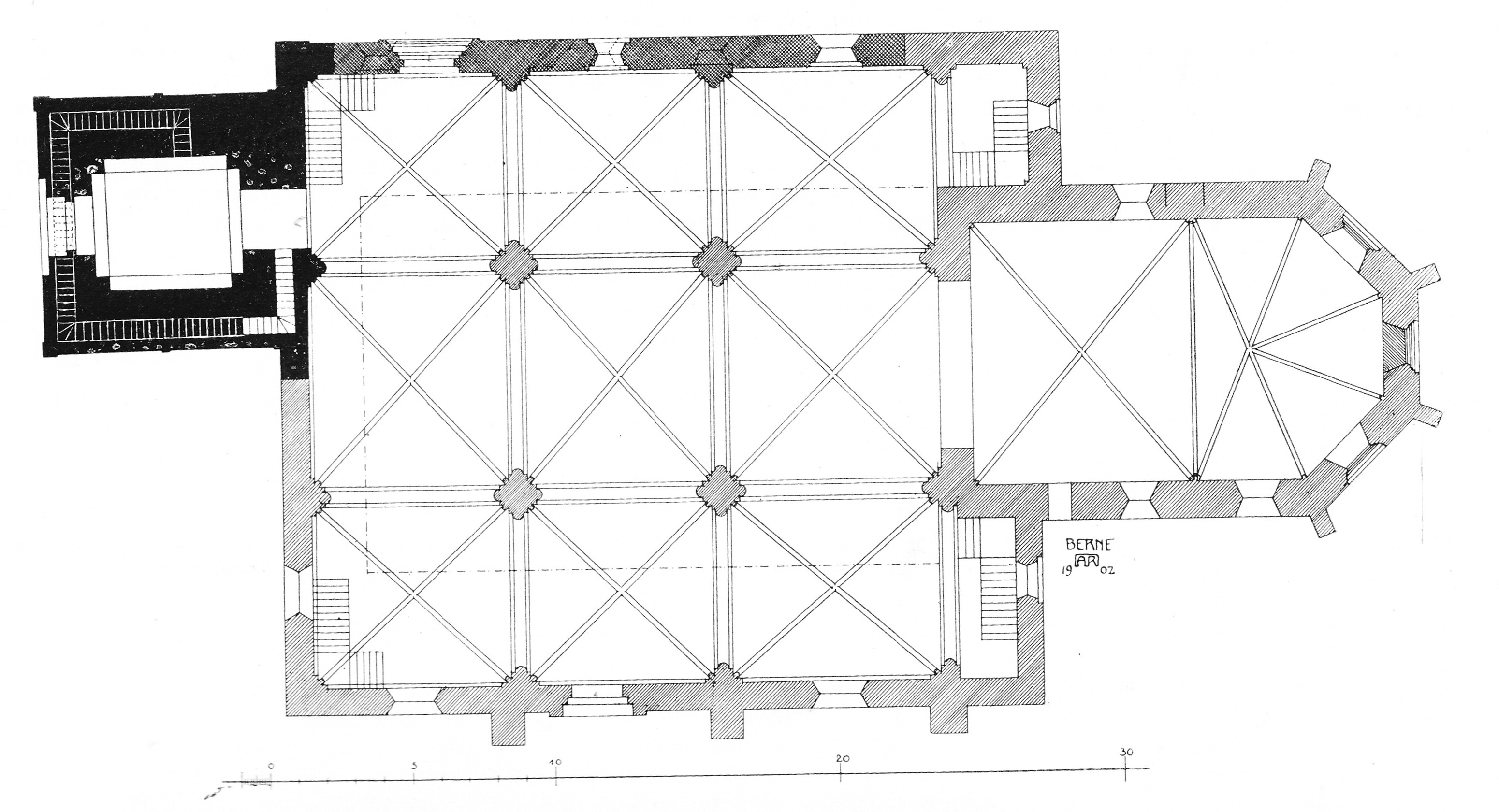 Grundriss der Ägidienkirche in Berne (Niedersachsen). Turm (schwarz) und Nordwand (kreuzschraffiert) 12. Jahrhundert. Die schraffierten Teile 13. Jahrhundert (Halle) und 15. Jh. (Chor).